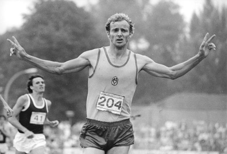 Olaf Beyer ADN-ZB Thieme 12.8.81 Jena: Vorschaumotiv zum Leichtathletik-Europapokal-Finale am 15.-16.8.81 in Zagreb- Zu den nominierten Athleten des DDR-Leichtathletikverbandes gehört der zweifache DDR-Meister (800 und 1500 m) von Jena, Olaf Beyer (ASK Potsdam) .